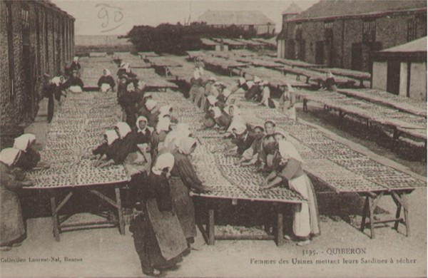 Femmes mettant leurs sardines à sécher dans une conserverie de Quiberon, Morbihan, France